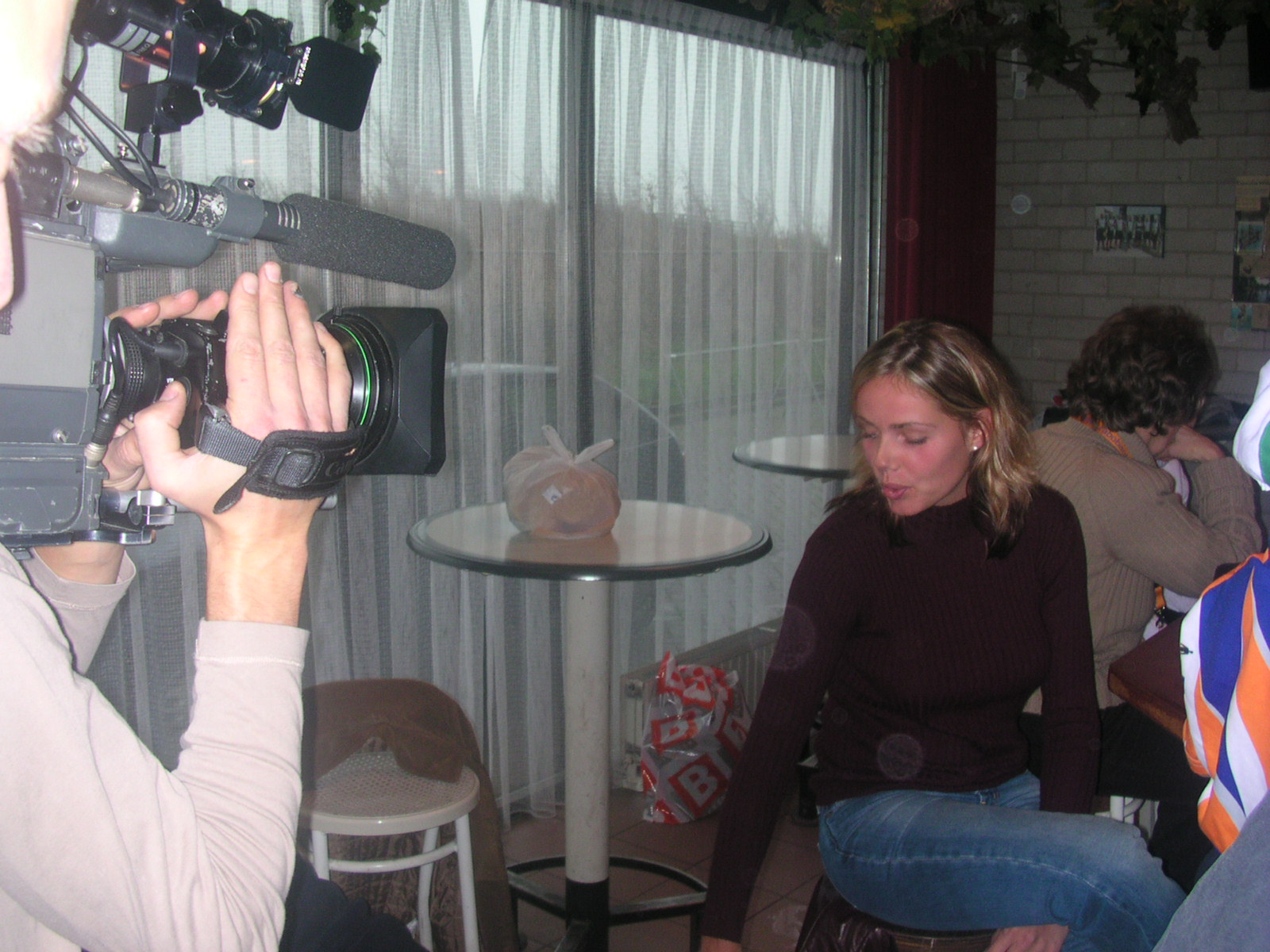 Nerena Boogerd-Ruinemans (Steenwijk, 5 november 1979) is een Nederlands deelneemster aan een missverkiezing: ze was Miss Nederland 1998/1999. Tegenwoordig is ze vooral bekend als echtgenote van de wielrenner Michael Boogerd.